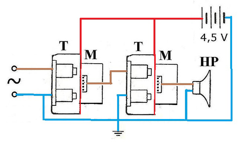 Amplificateur micro téléphonique est (écouteur actionnant un micro au charbon par une même membrane). Composé de deux éléments micro téléphoniques en série, il atteint le maximum de sensibilité possible.